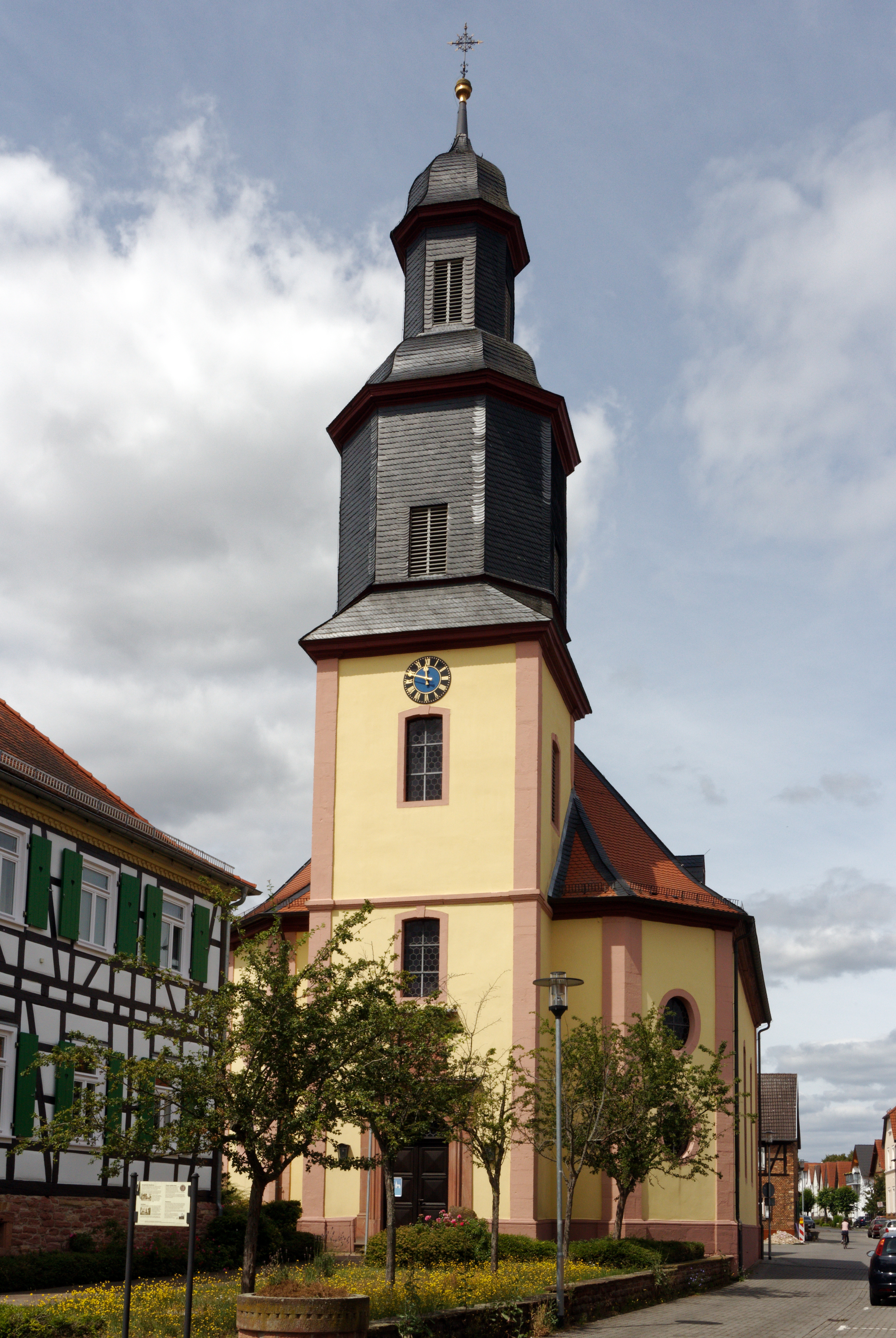 Evangelische Kirche in Dudenhofen, einem Stadtteil von Rodgau (Hessen). Das Foto zeigt die Frontalansicht mit Hauptportal und Kirchturm. Links ist das Rektor-Geißler-Haus, das ebenfalls unter Denkmalschutz steht.